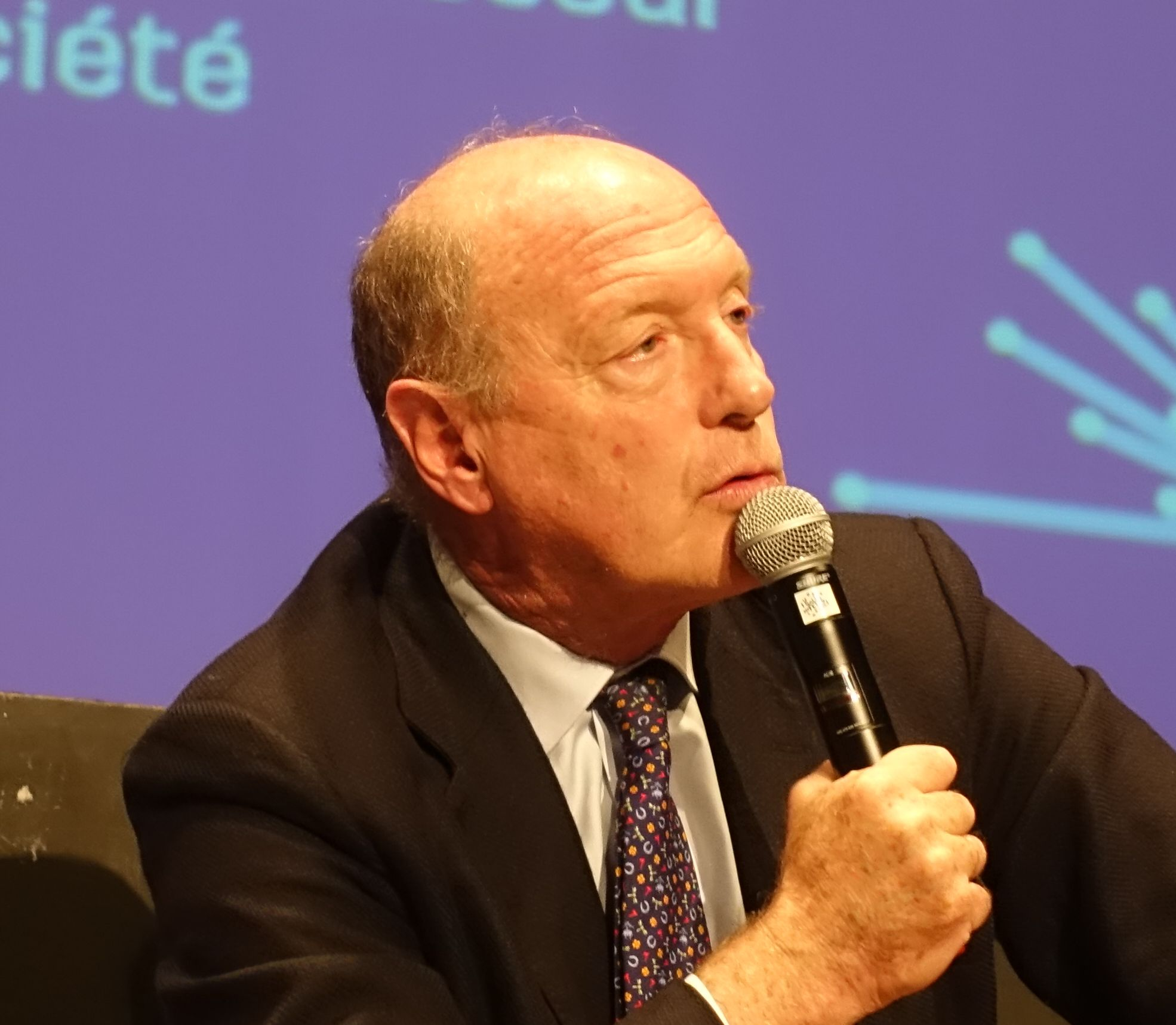 Conférence Migrations Bordeaux 2050